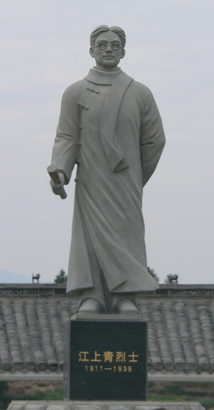 中文（台灣）: 江上青